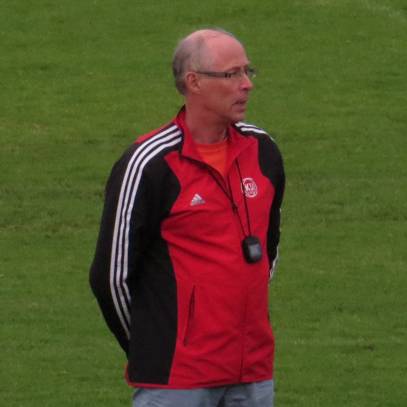 Ari Väänänen, entinen suomalainen pituushyppääjä ja pikajuoksija Karhulan keskuskentällä vuonna 2015.